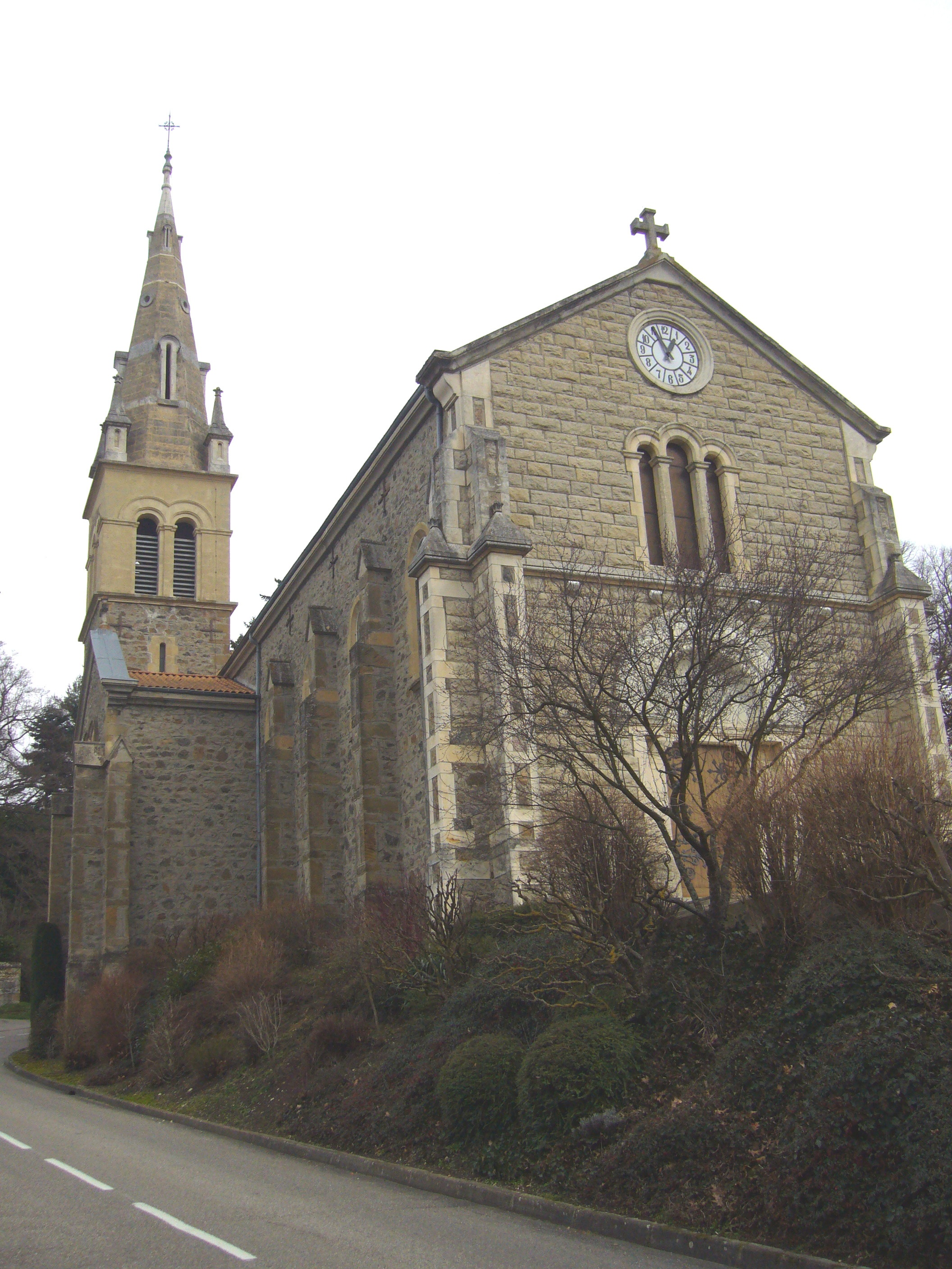 Eglise d'Estrablin, Isère, France.